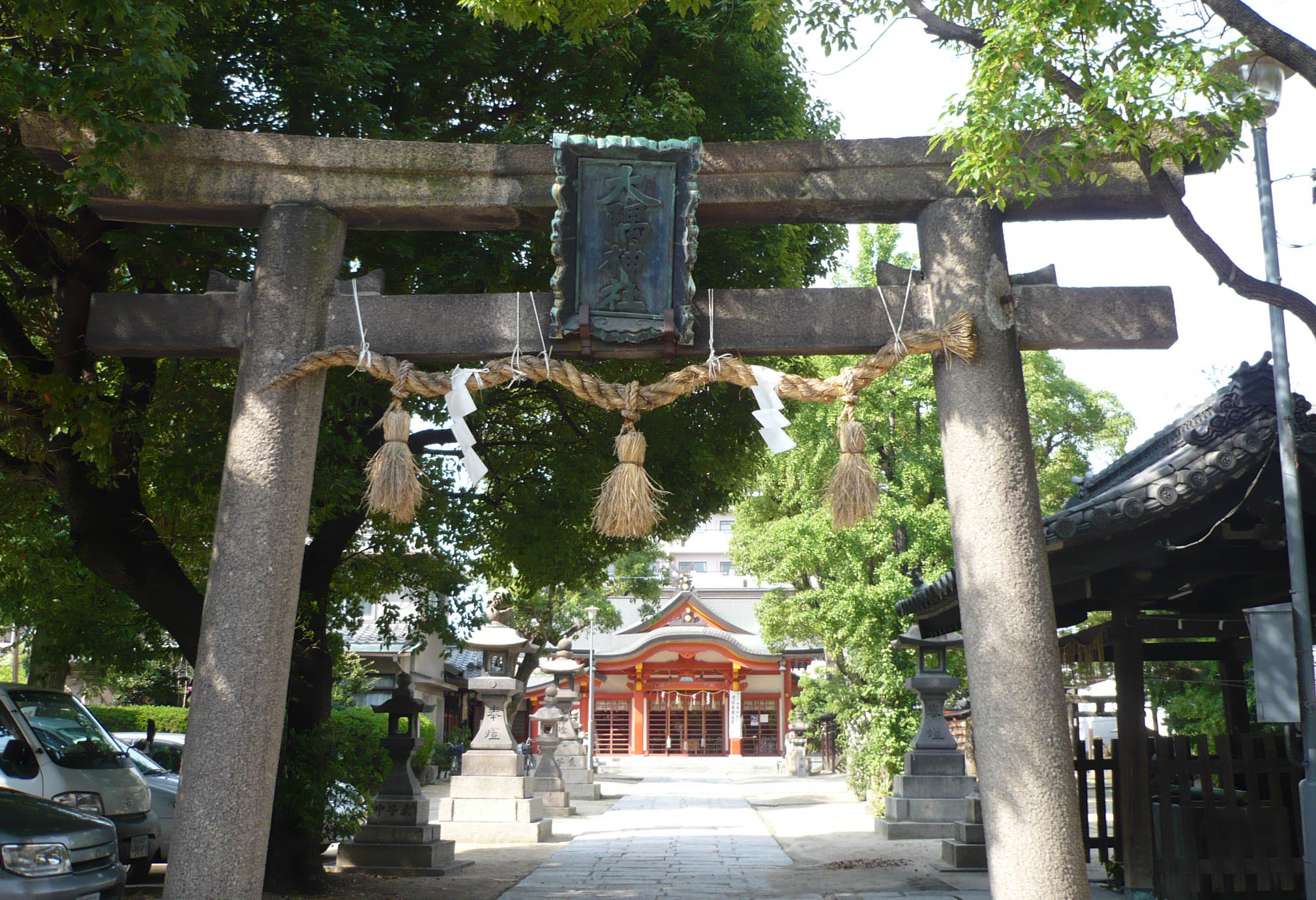 大隅神社の鳥居